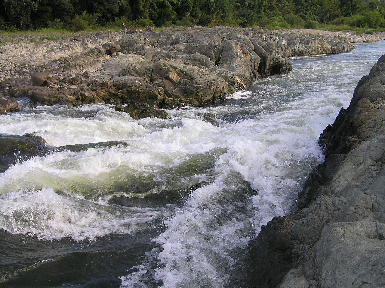 加古川万歳橋下流の瀬（滝）